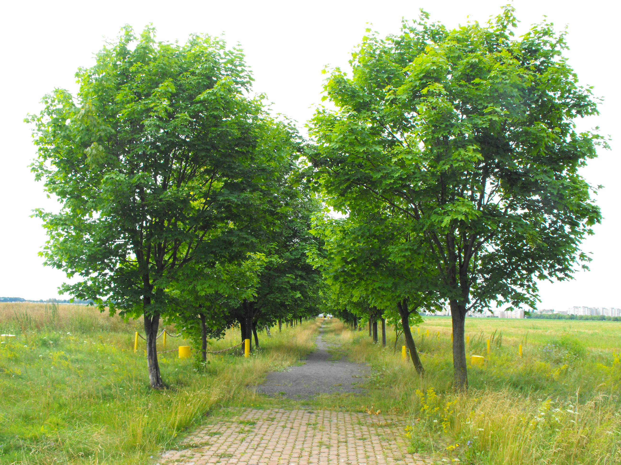 Аллея на окраине Пинска в урочище Добрая воля, ведущая к мемориалу на месте массовых убийств евреев Пинска во время Холокоста